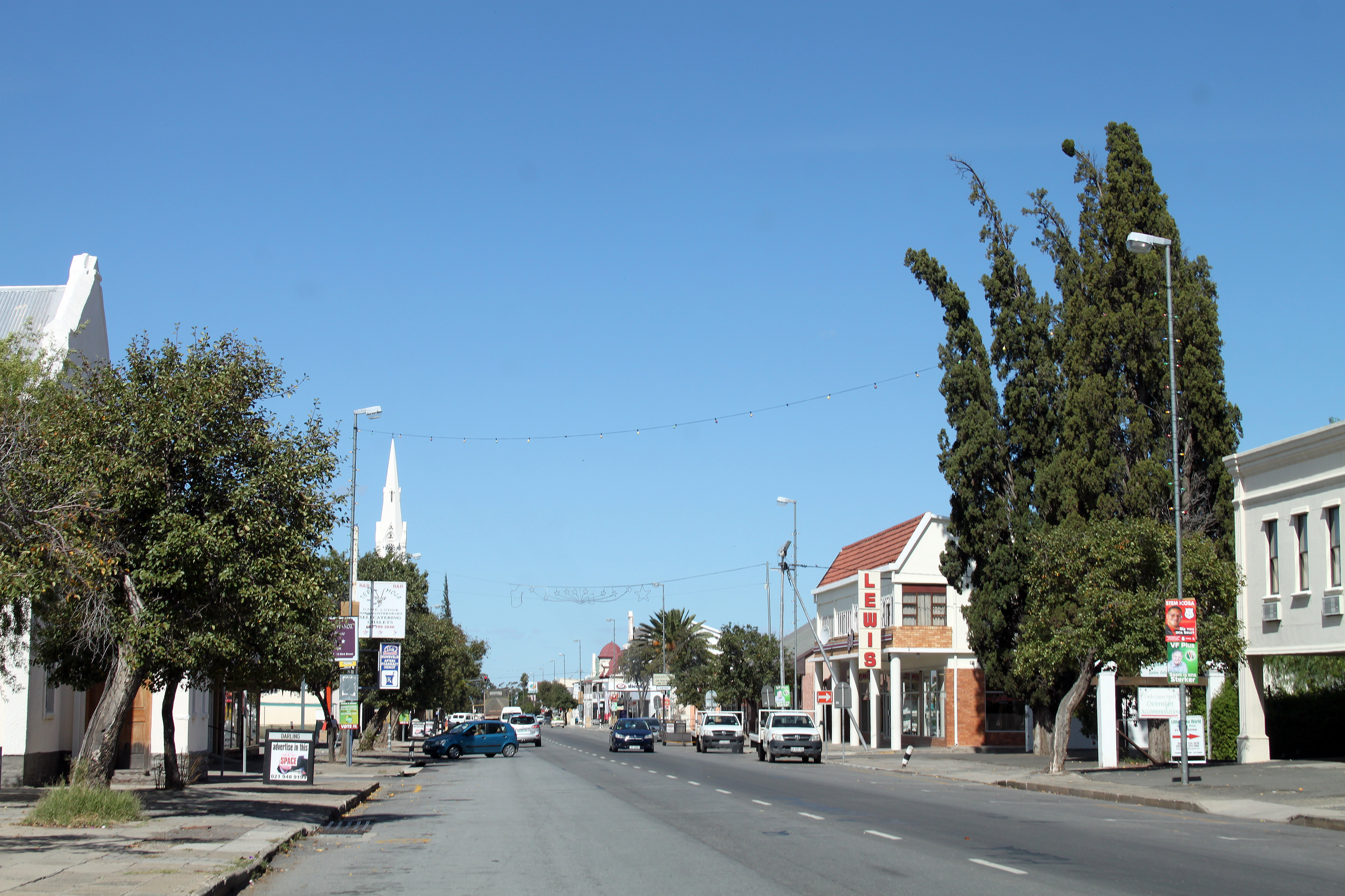 Main Street, Beaufort West